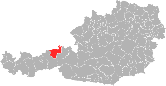 Bezirk Kufstein in Österreich